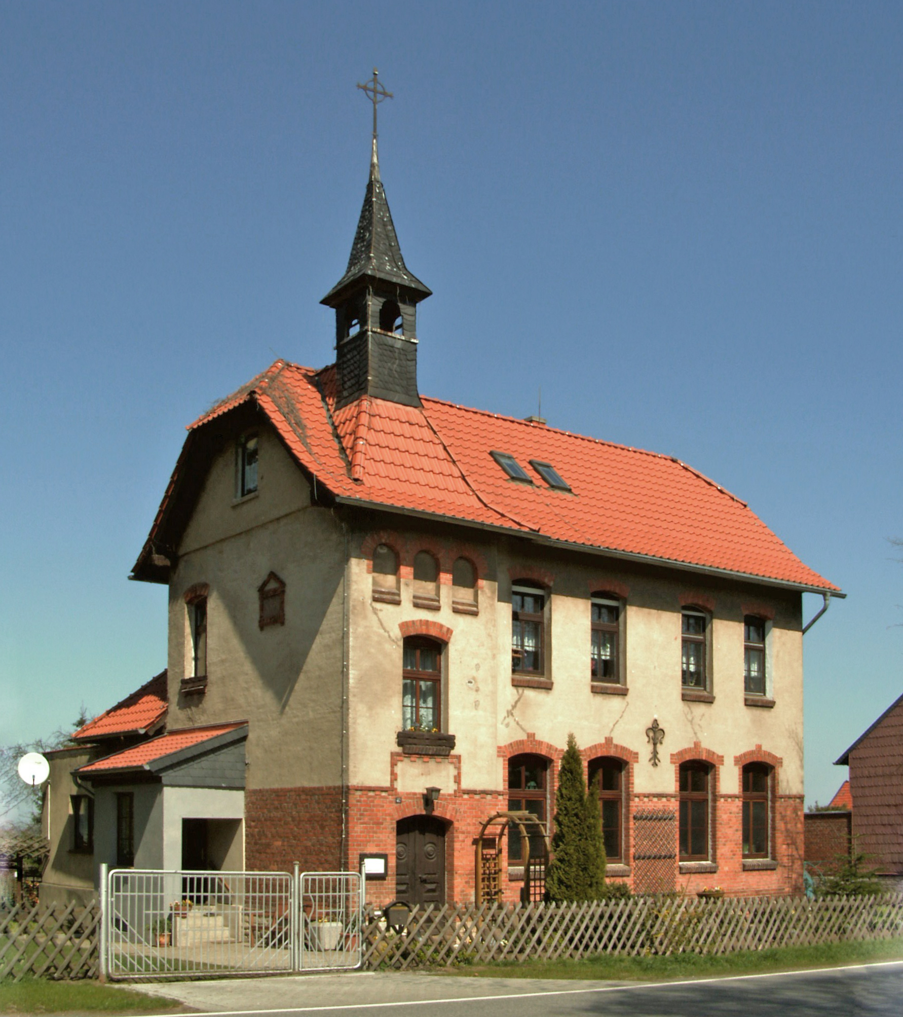 Katholisches Missionshaus mit Herz-Jesu-Kapelle in ehemaliger Schule in Eilenstedt, Landkreis Harz